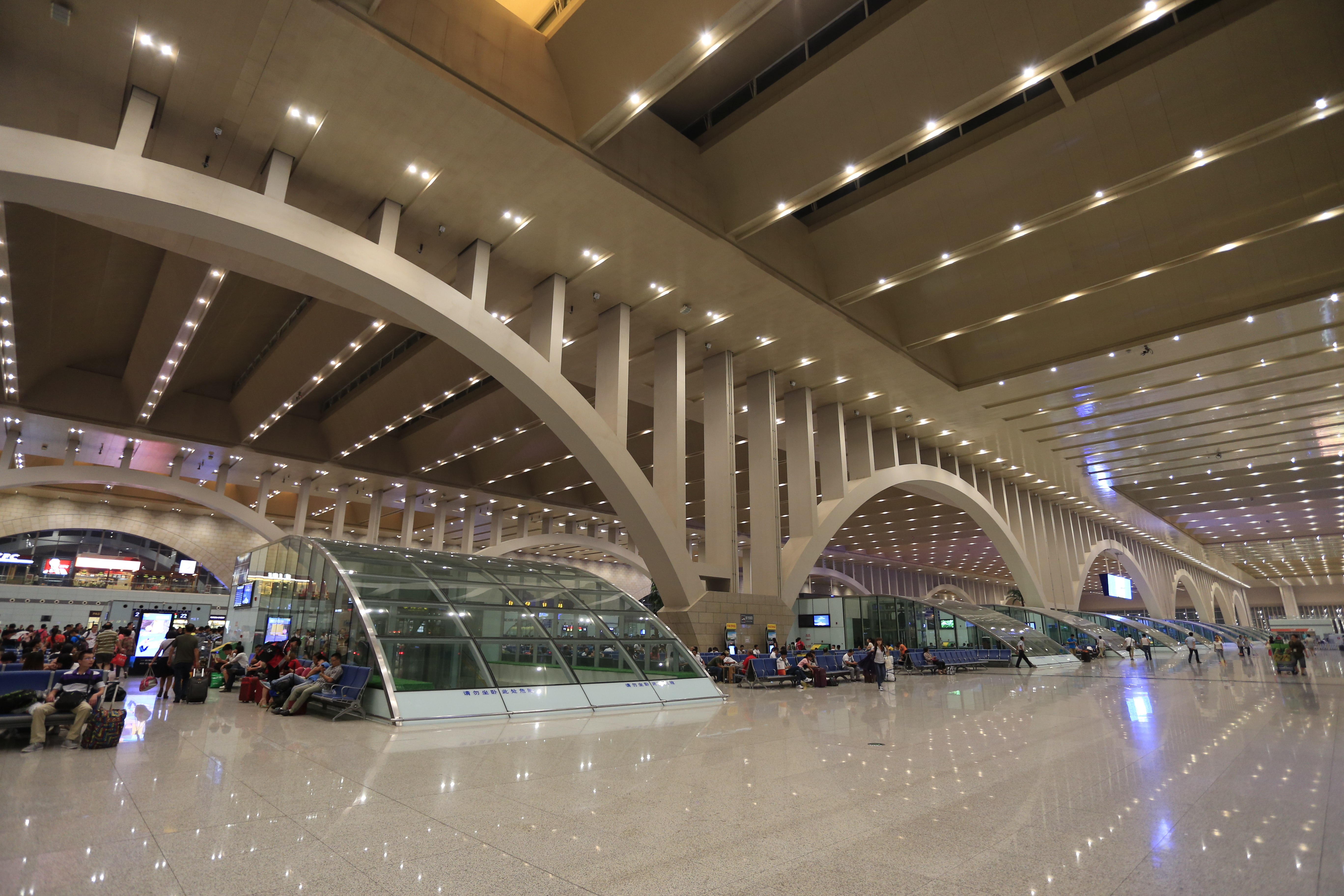 石家庄站